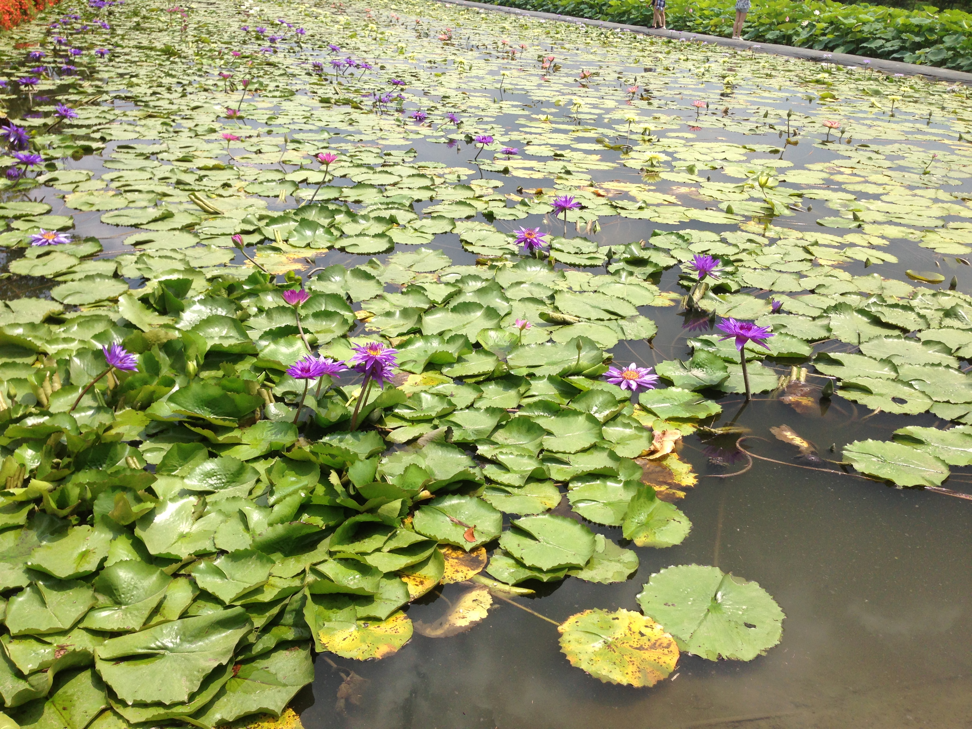 中文（台灣）: 白河區的香水蓮花